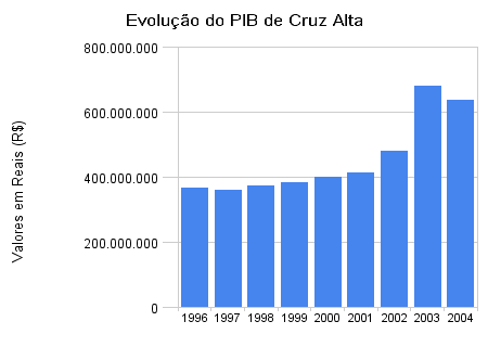 Evoluação do Produto Interno Bruto de Cruz alta entre 1996 e 2004